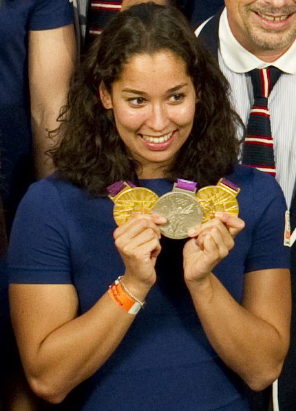 Groepsfoto van de Olympische medaillewinnaars samen met minister-president Rutte in 2012.